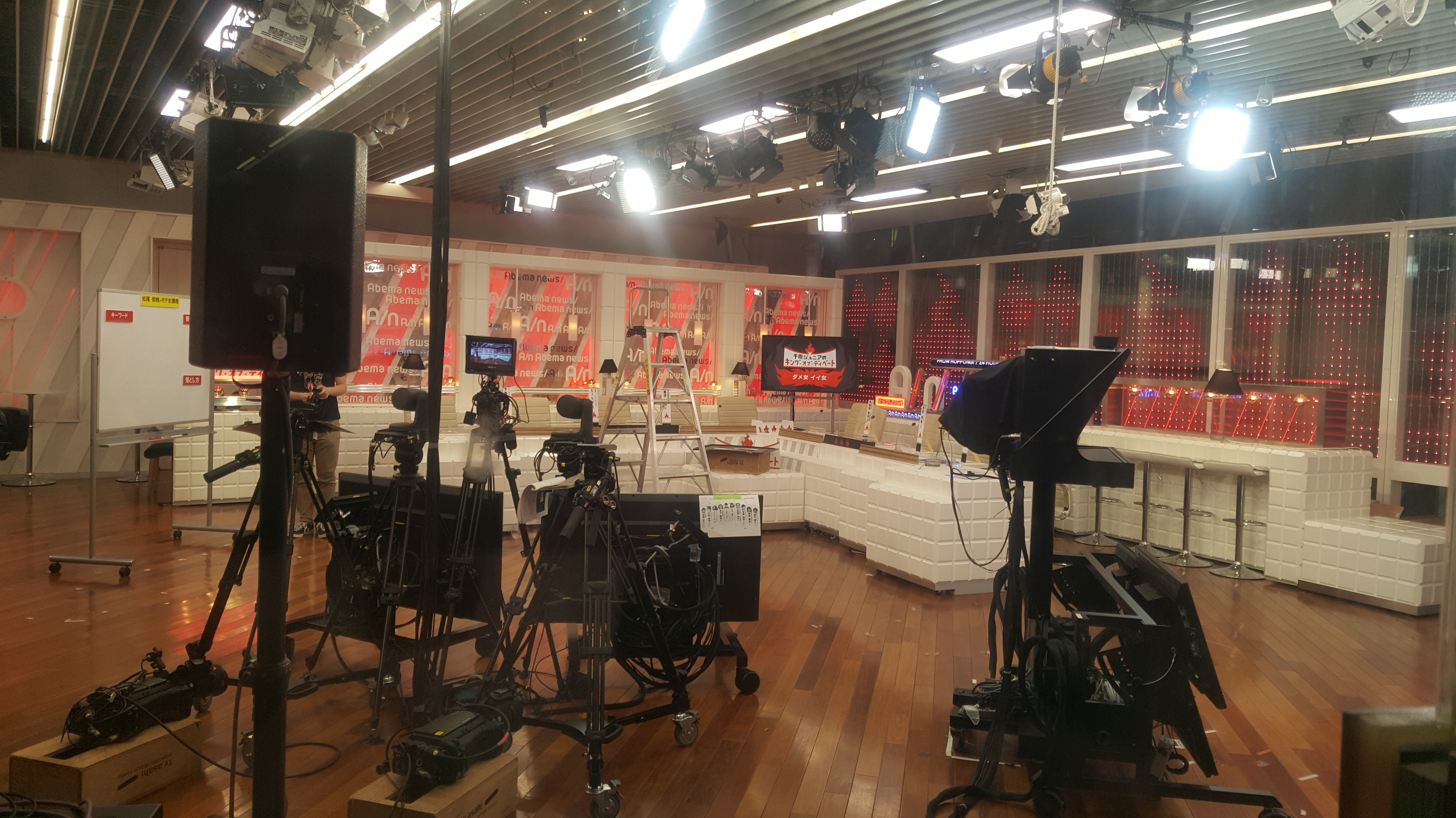 EX Keyakizaka studio